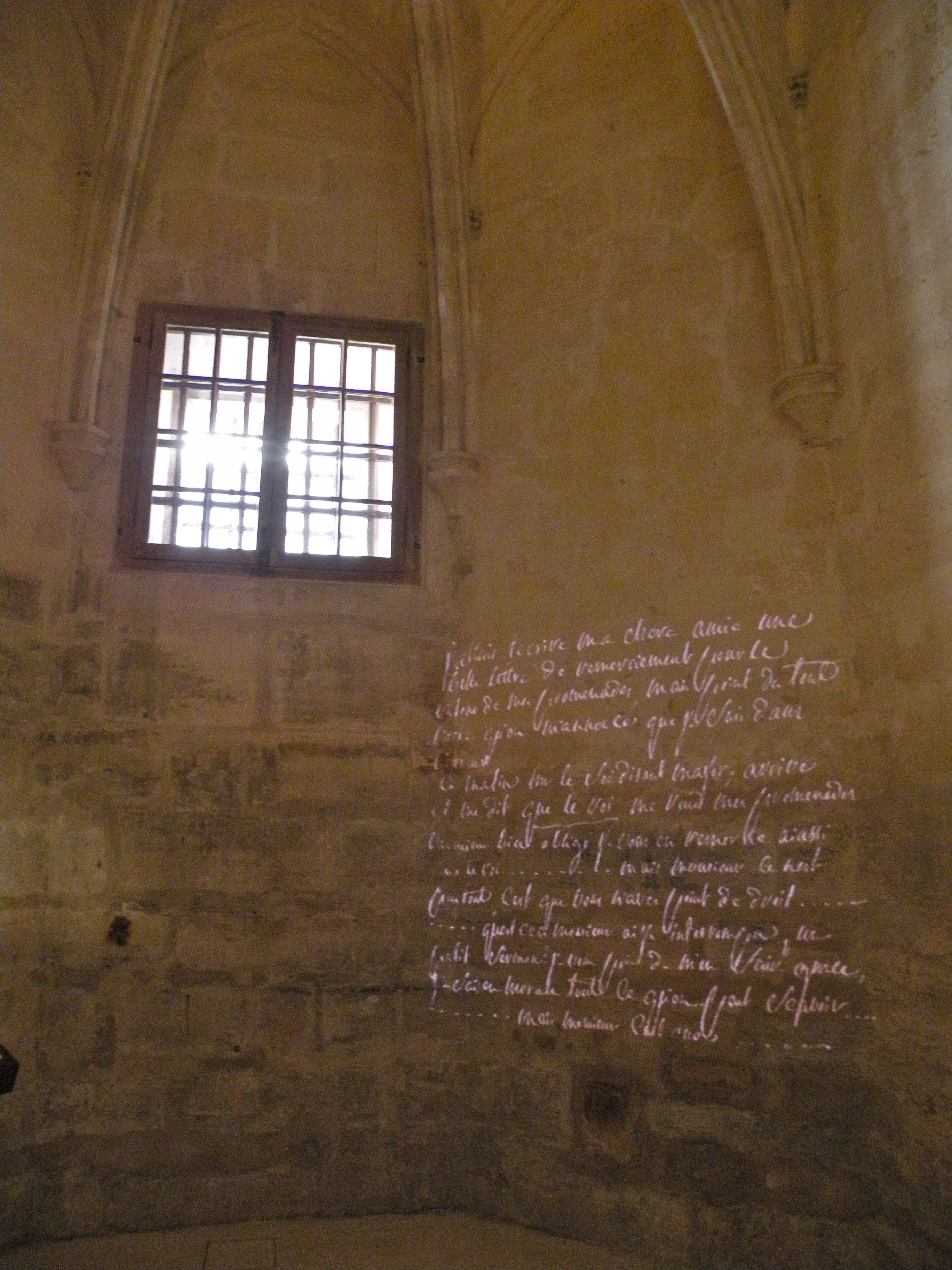 Donjon du Château de Vincennes : cellule du marquis de sade